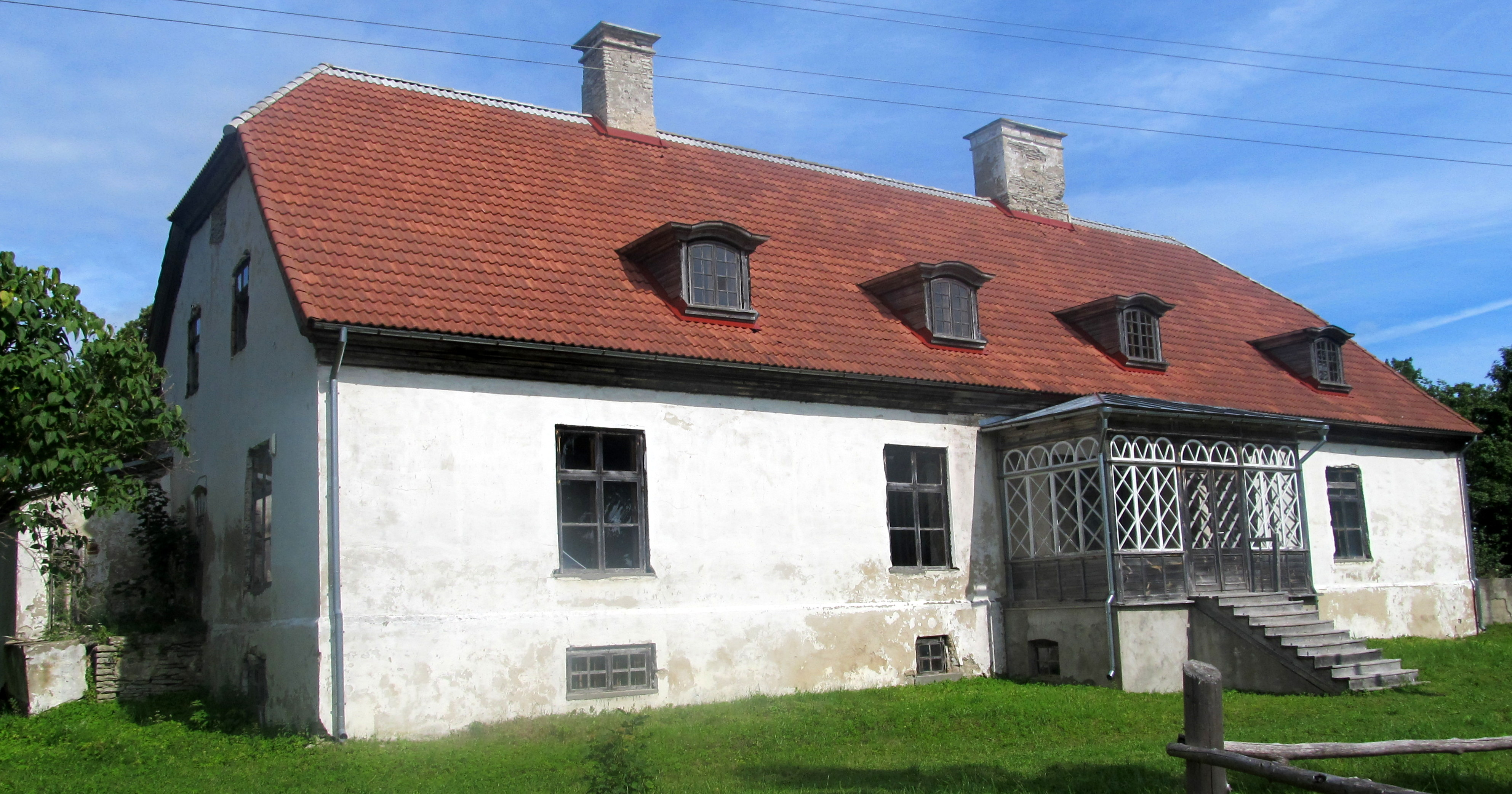 Reigi pastoraadi peahoone